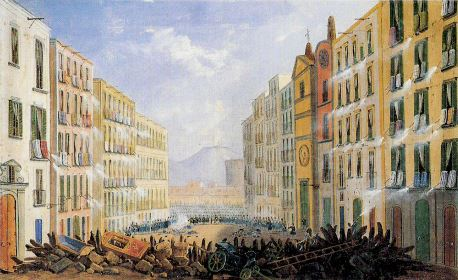 Barricate rivoluzionarie in via Santa Brigida (Napoli) 15 maggio 1848